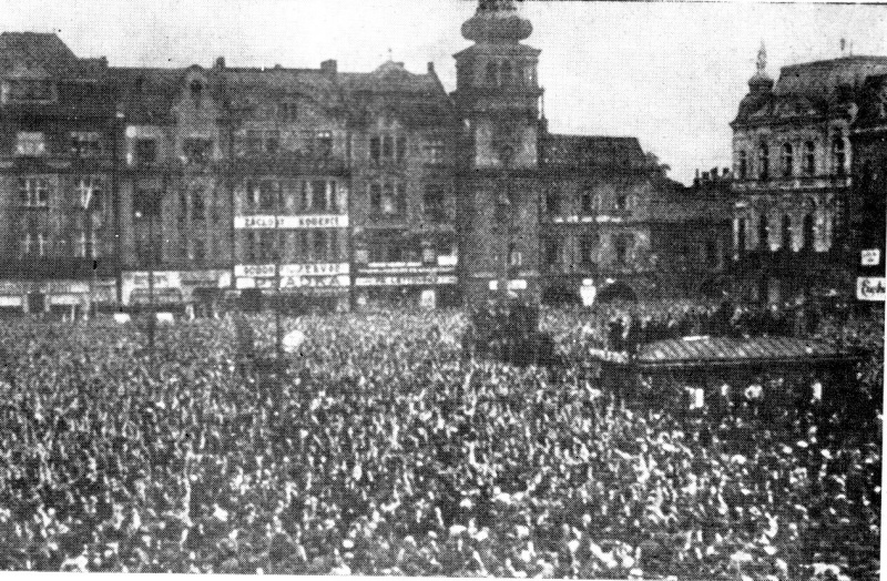 Manifestace Čechů, Němců a Poláků v Moravské Ostravě v září 1938 na obranu republiky